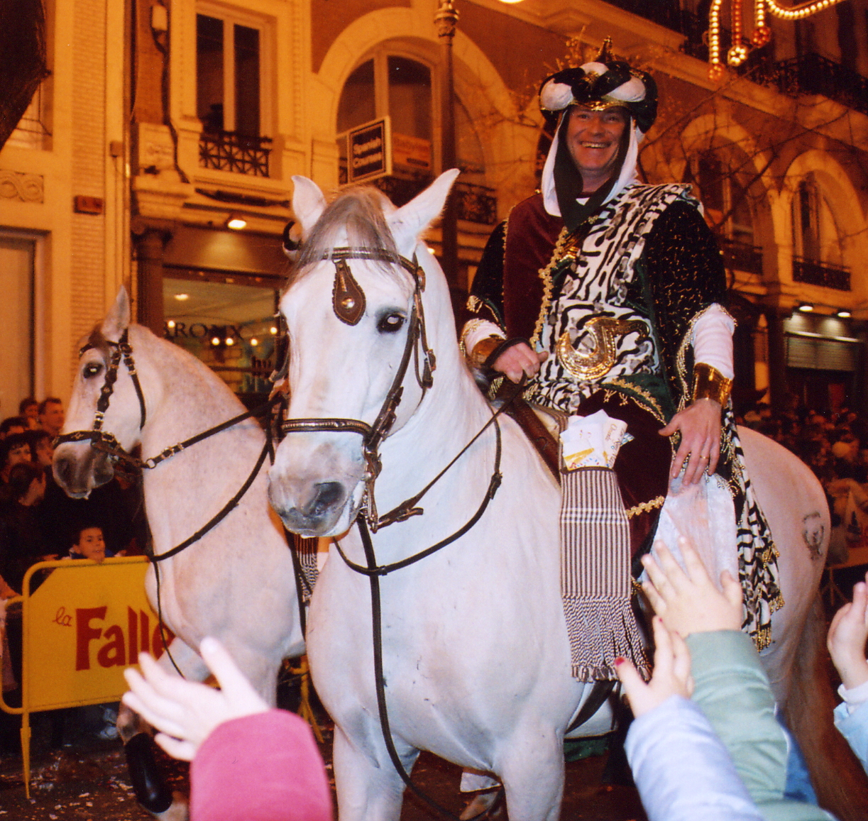 Cavalcada dels Reis, Valencia-España